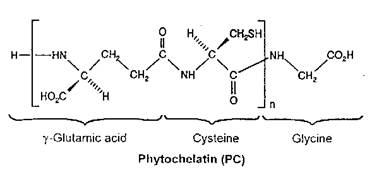 La structure chimique d'une phytochélatine.